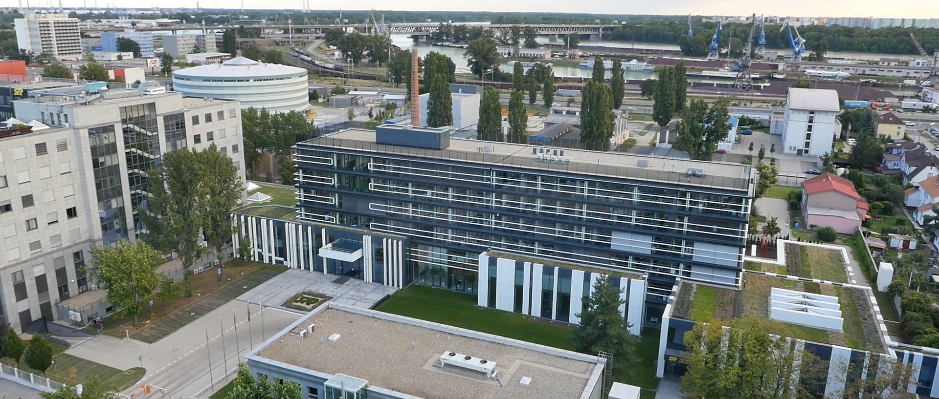 Sídlo na Mlynských nivách 44/A v Bratislave